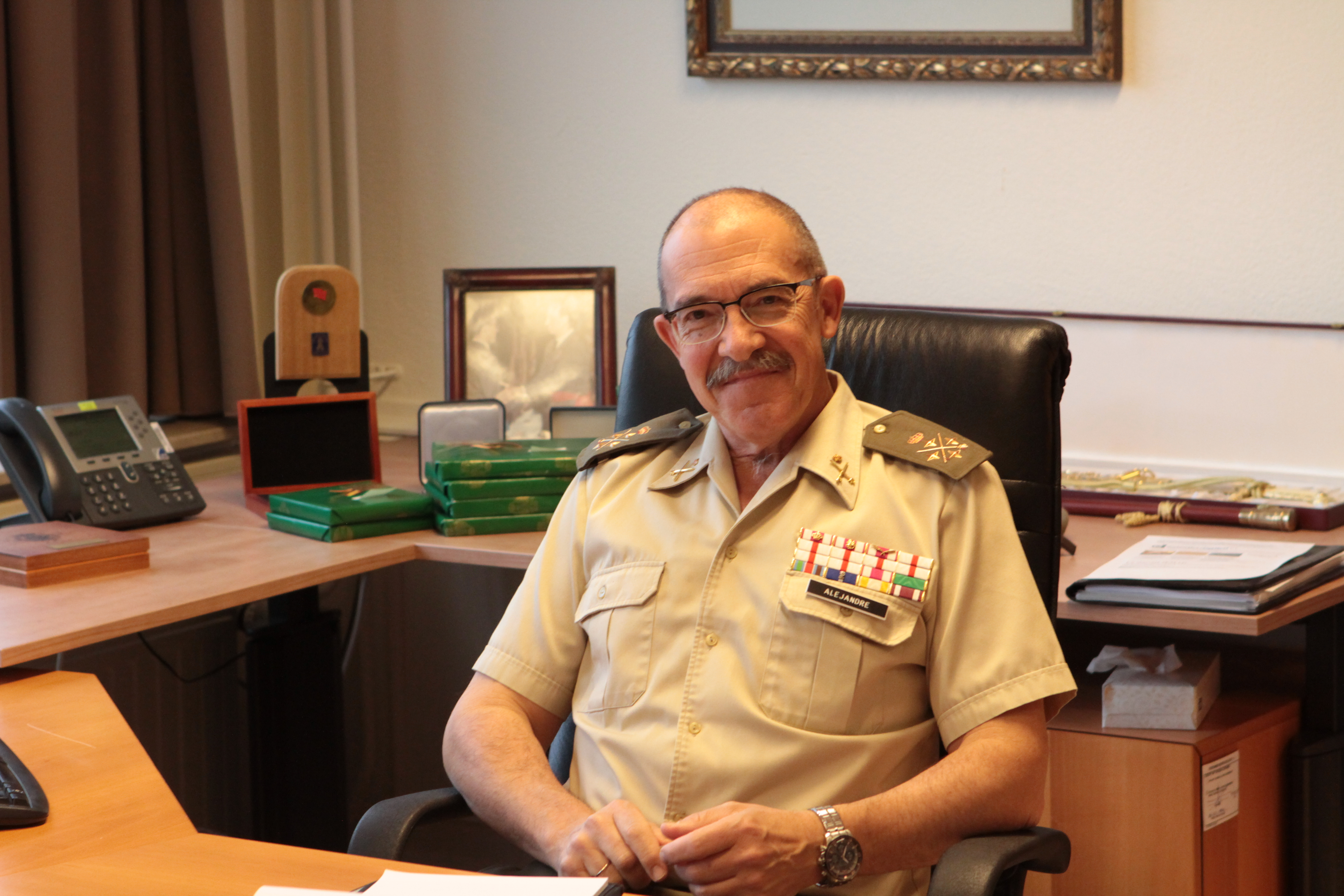 General Fernando Alejandre leaves JFC Brunssum